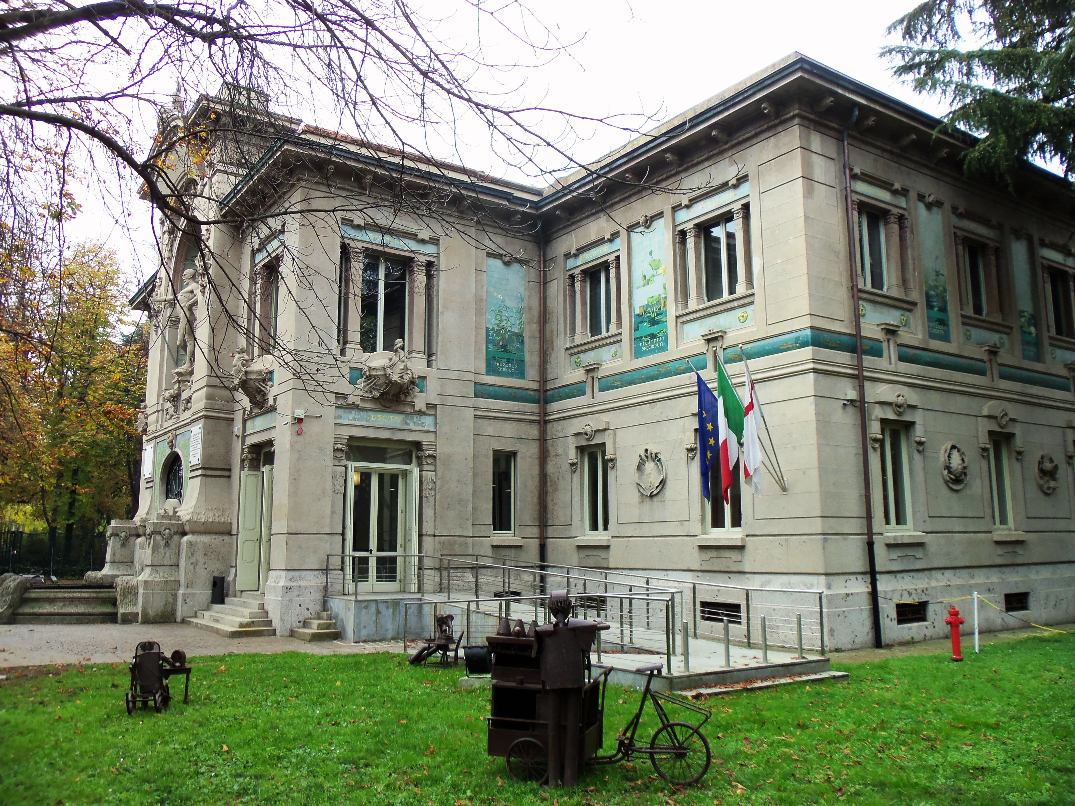 Milano, parco Sempione, l'Acquario civico, arch. Lovati (1905)